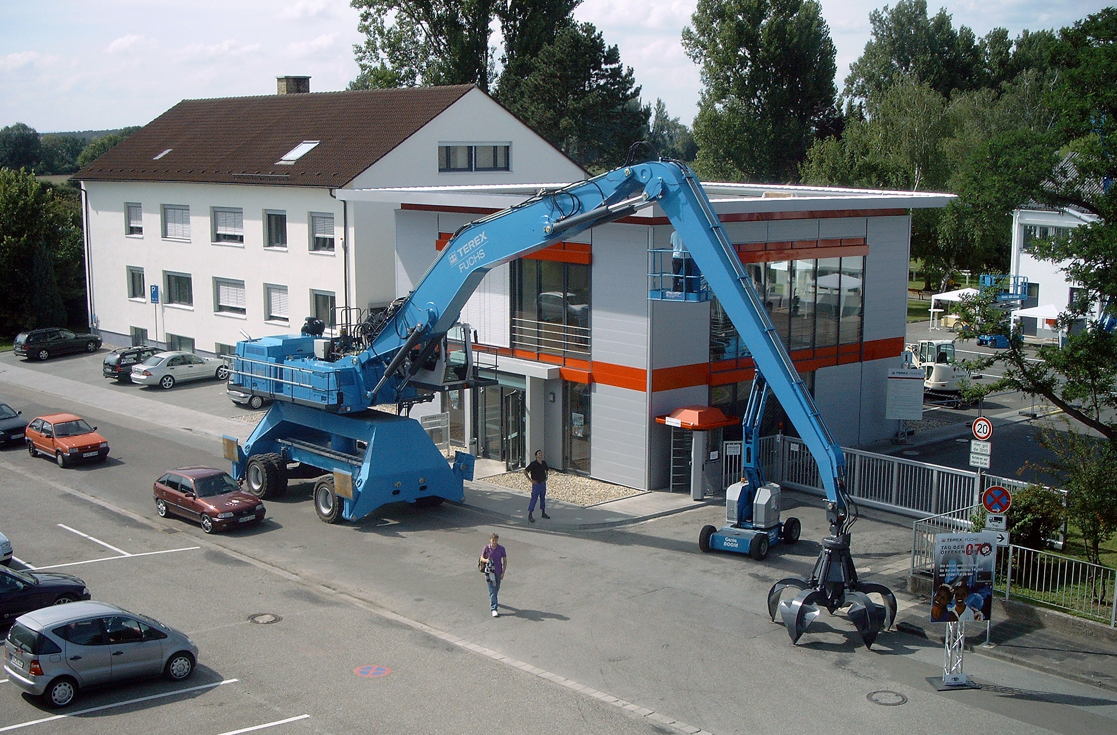 Terex MHL 585 beim Tag der Offenen Tür zum 50. Jubiläum des Baggerherstellers Terex-Fuchs in Bad Schönborn